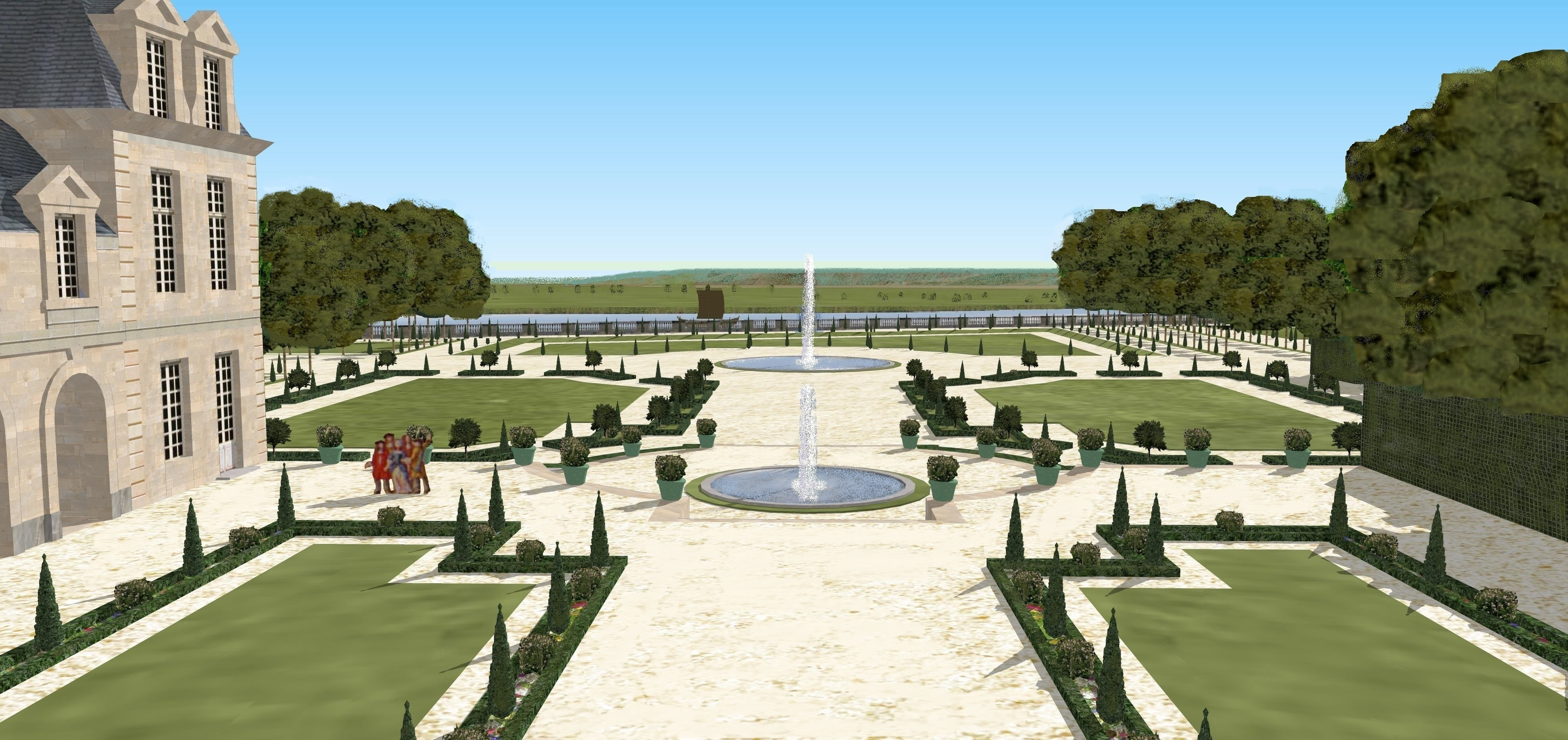 Vue des jardins bas de St Cloud depuis le haut de l'escalier.